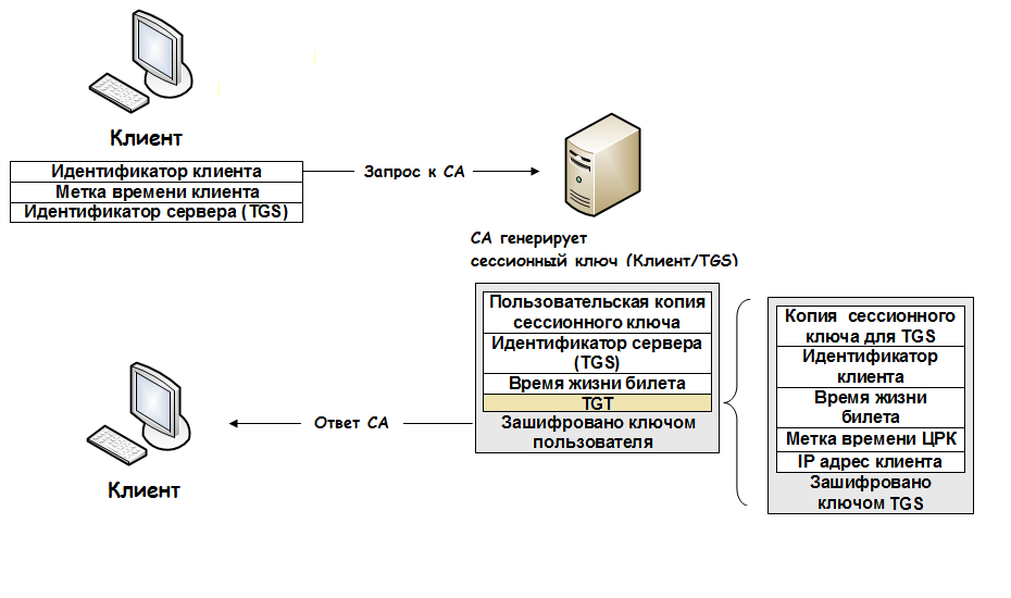 Аутентификация клиента